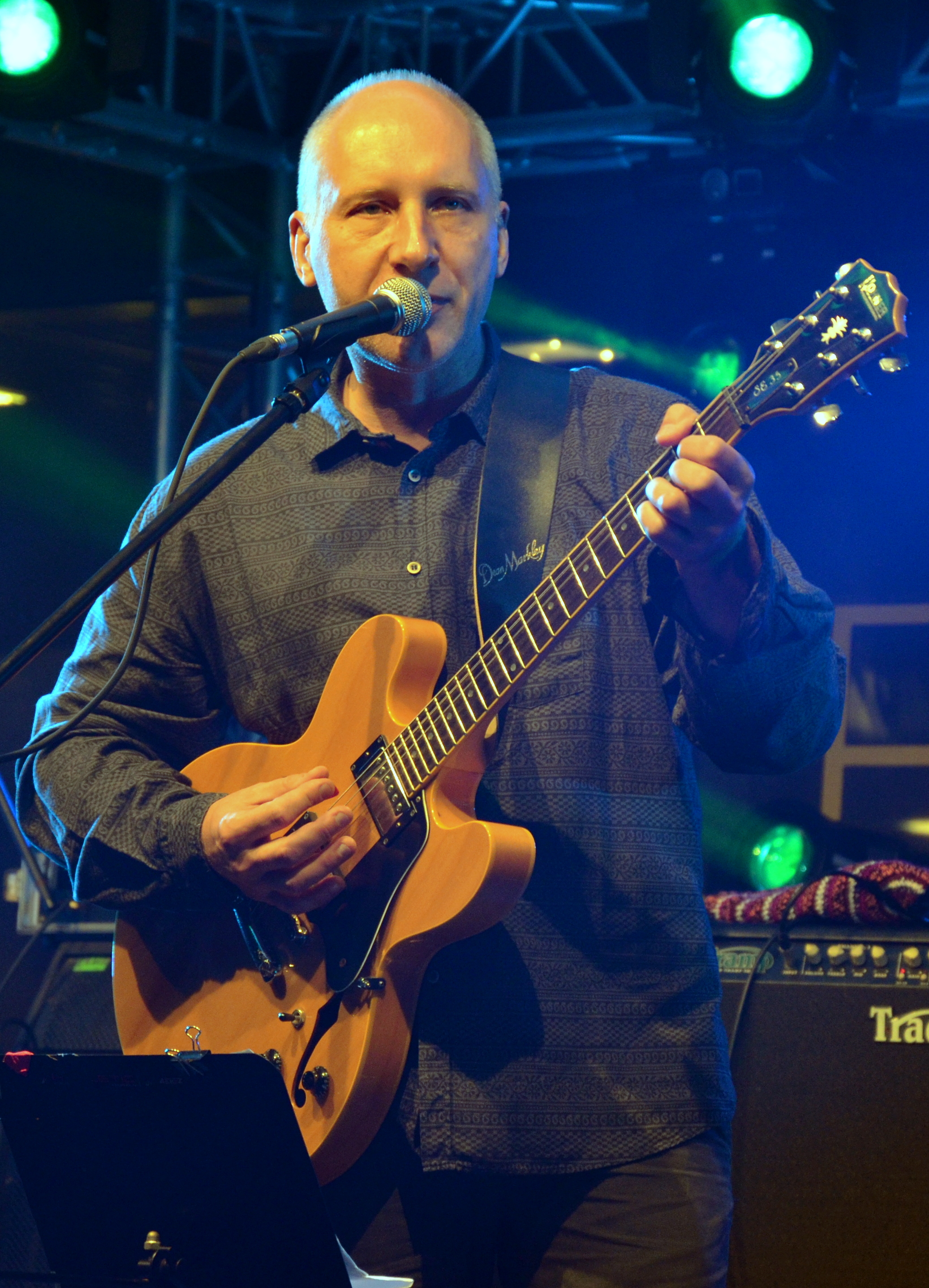 Konzert der Band-Elektrische Gitarre